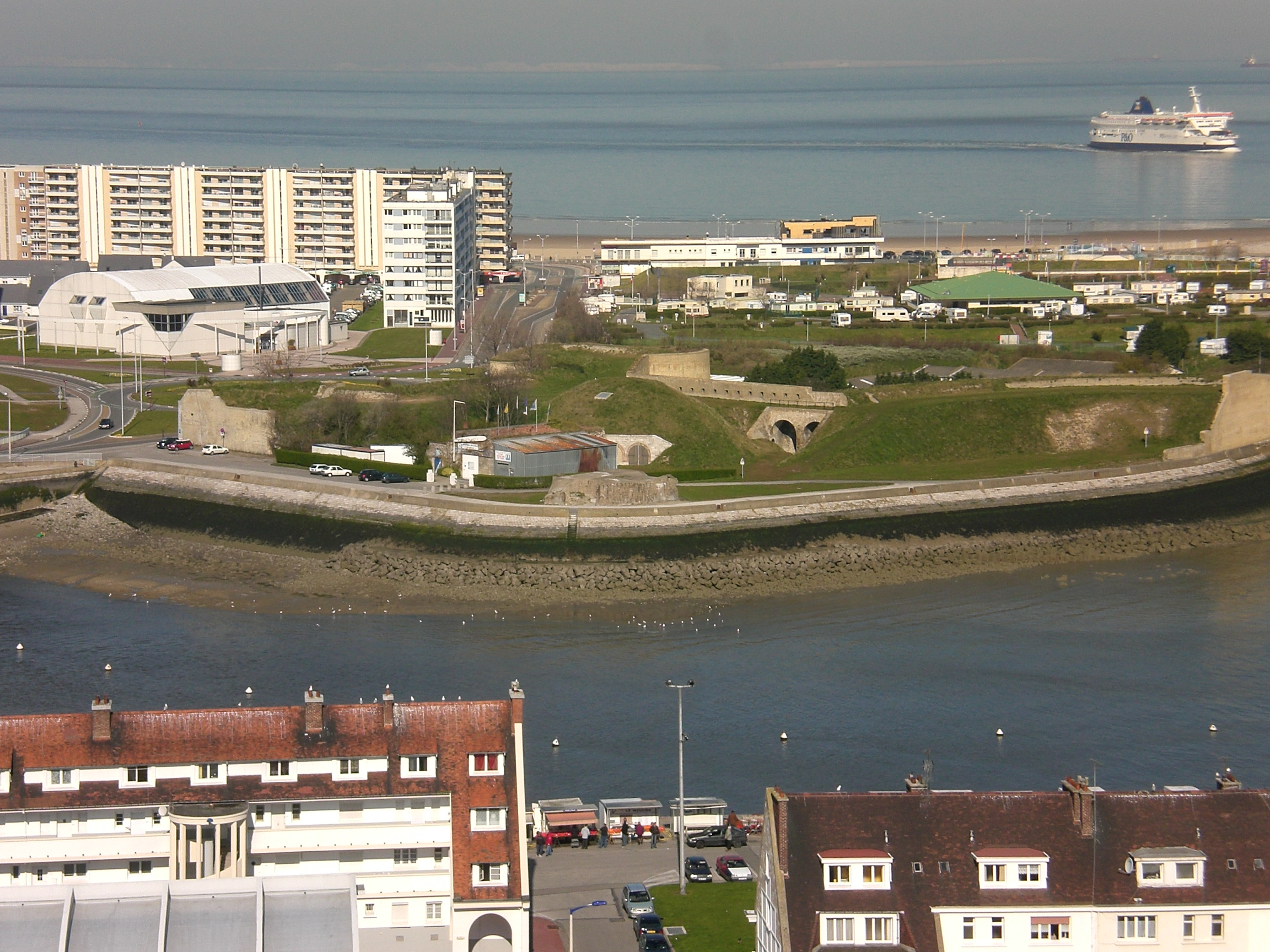 Le Fort Risban de Calais à l'entrée du port vu du phare.